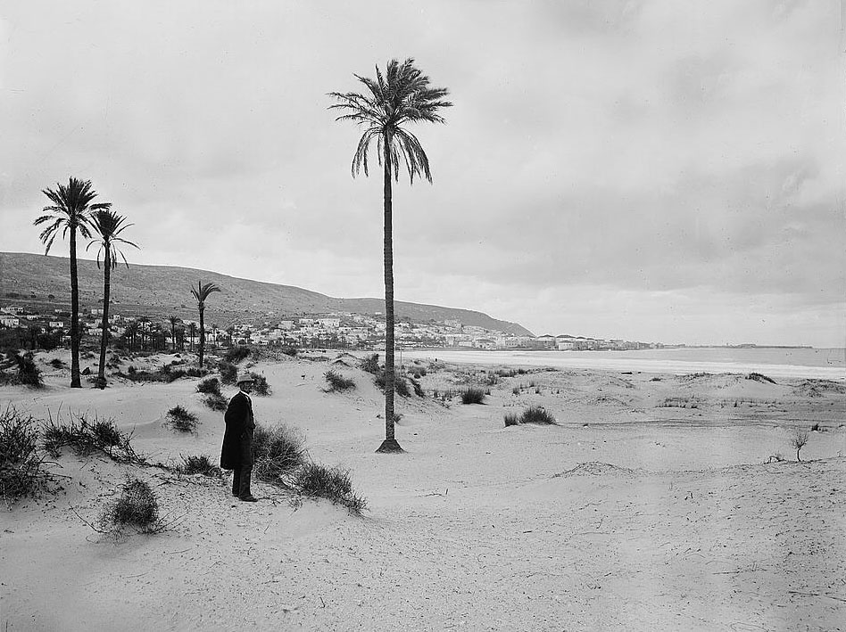 Historical images of Haifa תמונות היסטוריות של חיפה מבט על חיפה מחוף שמן, ברמת הדר הכרמל עדיין לא נבנה בית אחר. התמונה צולמה בין השנים 1898 ל-1907